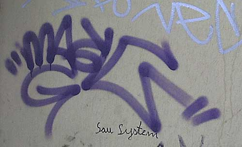 "Magic"-Tag in Düsseldorf - Bildquelle: mit freundlicher Genehmigung von Martin Milz (selbst fotografiert)